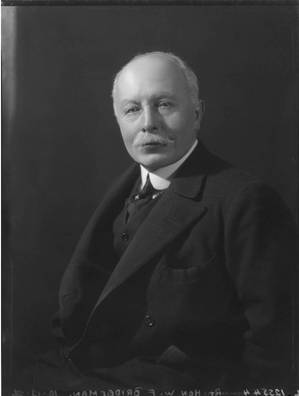 Lord Bridgeman